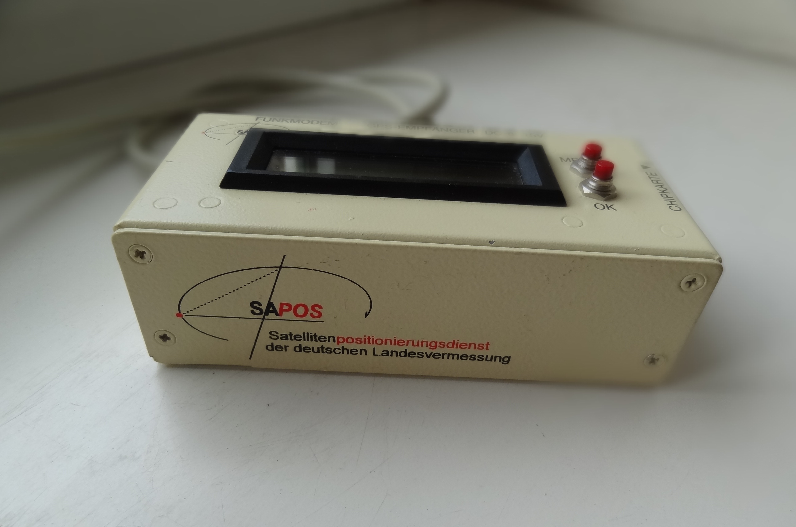 SAPOS-Decoder zum Dekodieren von SAPOS-Referenzdaten, die mit einem 2m-Band-Funkmodem empfangen werden.